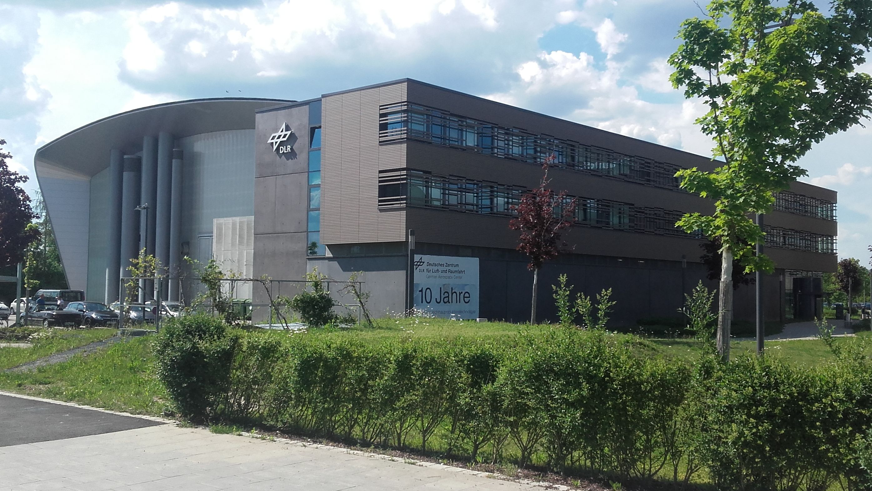 DLR im Innovationspark Augsburg